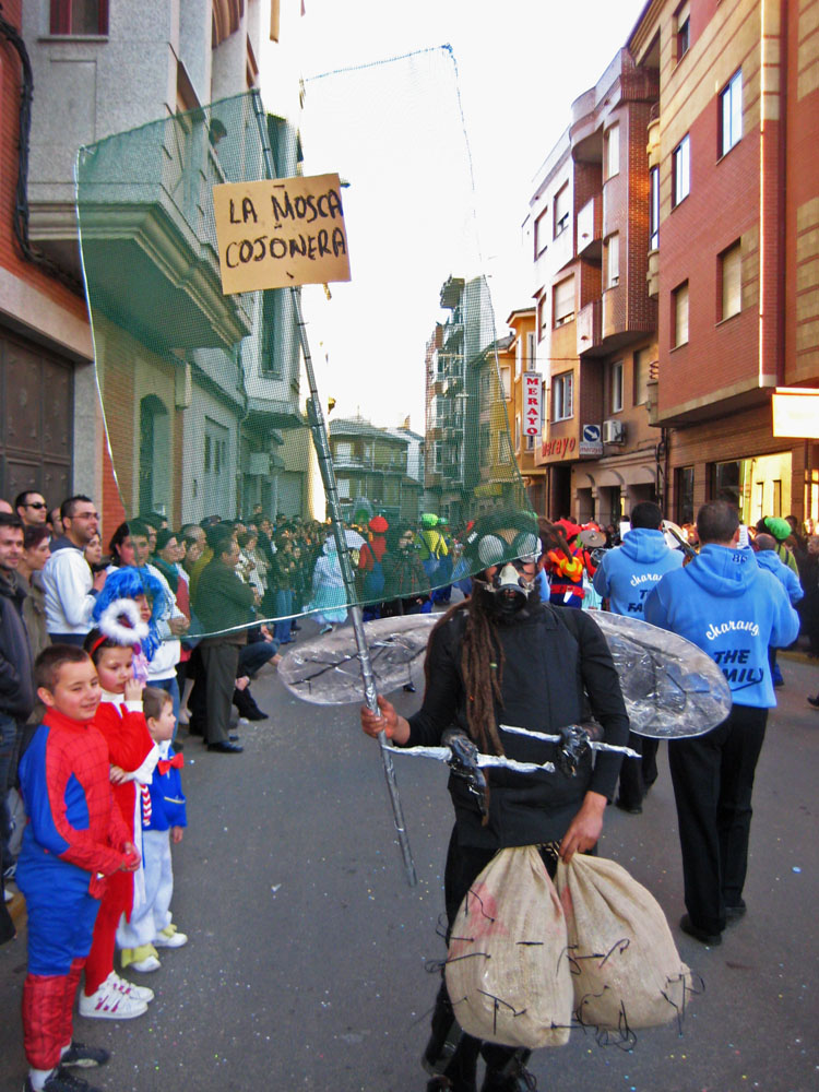 Carnavalero "por libre" en el desfile del Martes de Carnaval de La Bañeza.